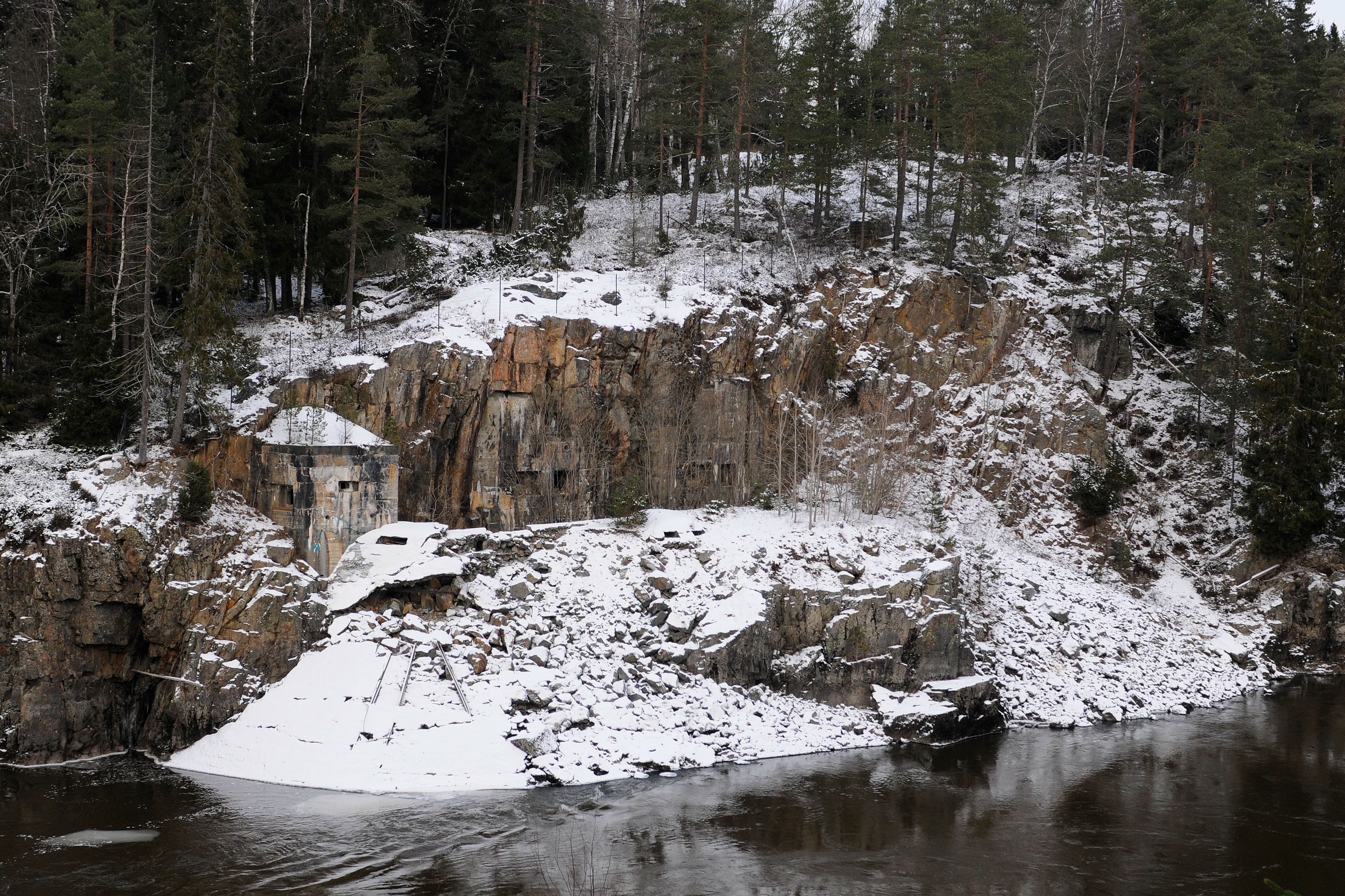 Langenes brogalleri in Østfold, Norway